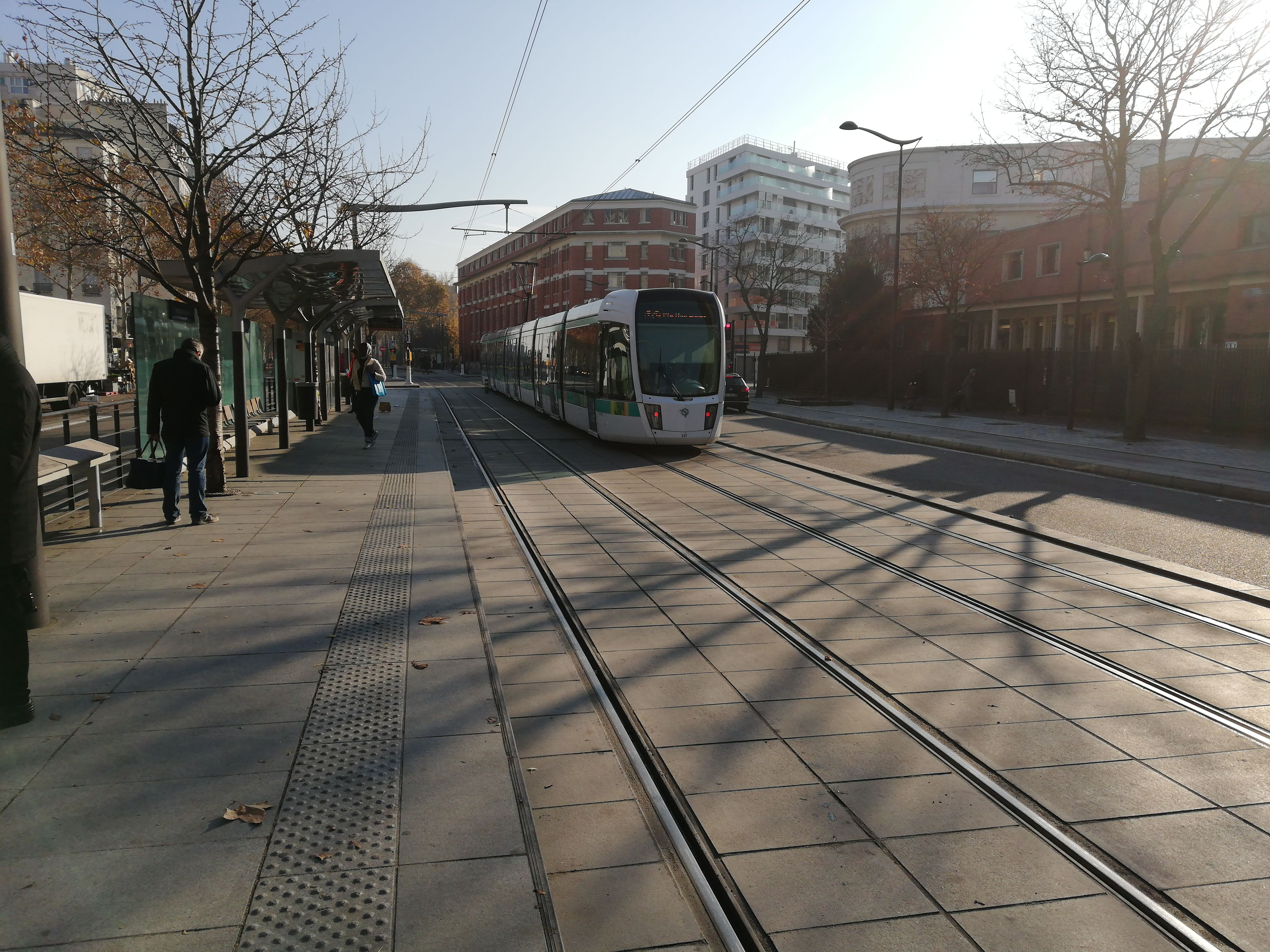 Quai vers Pont du Garigliano de la station Georges Brassens de la ligne 3a du tramway d'Île-de-France, en 2018. Un Citadis 402 en direction de Porte de Vincennes passe devant le quai.